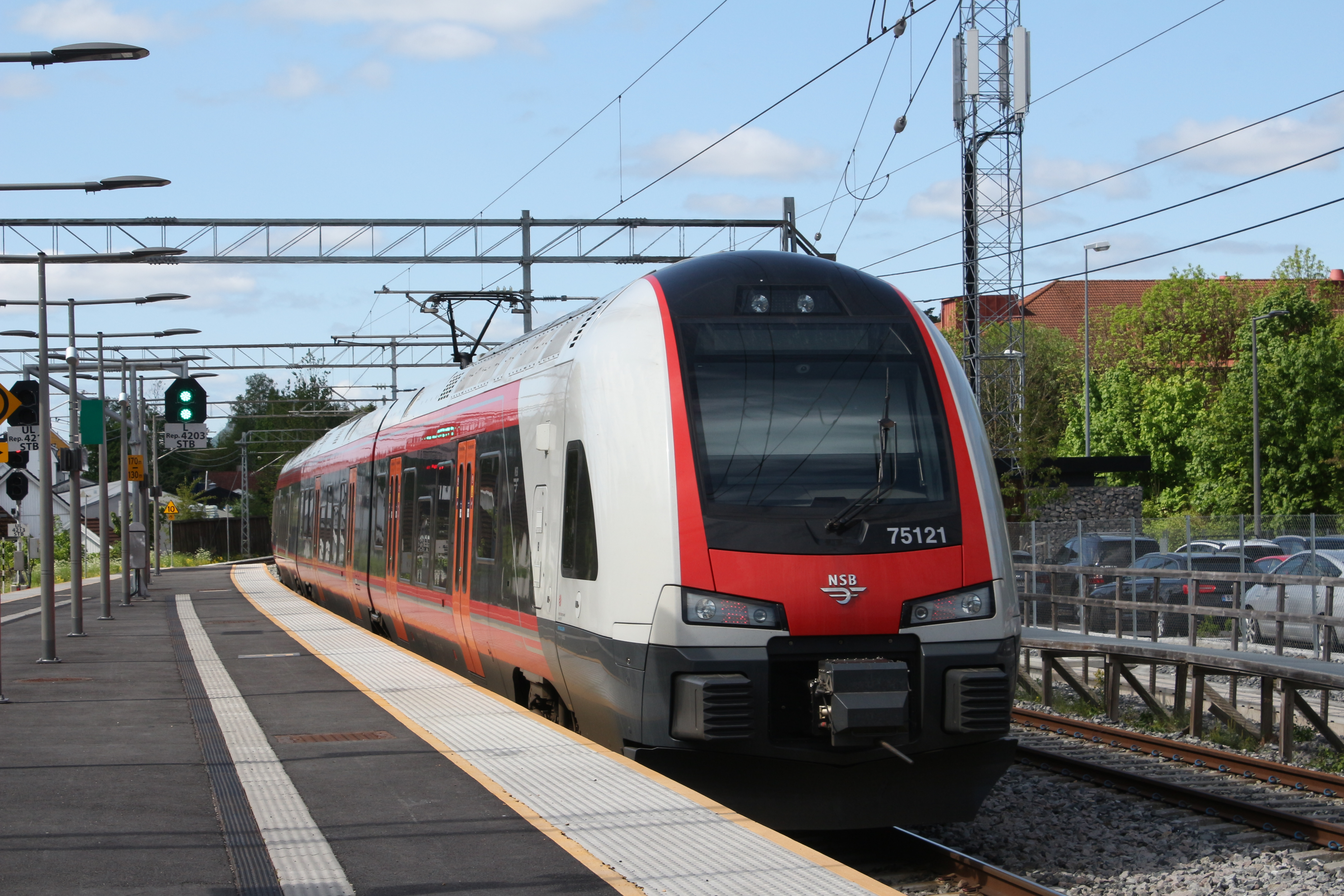 NSB type 75 på Stabekk stasjon